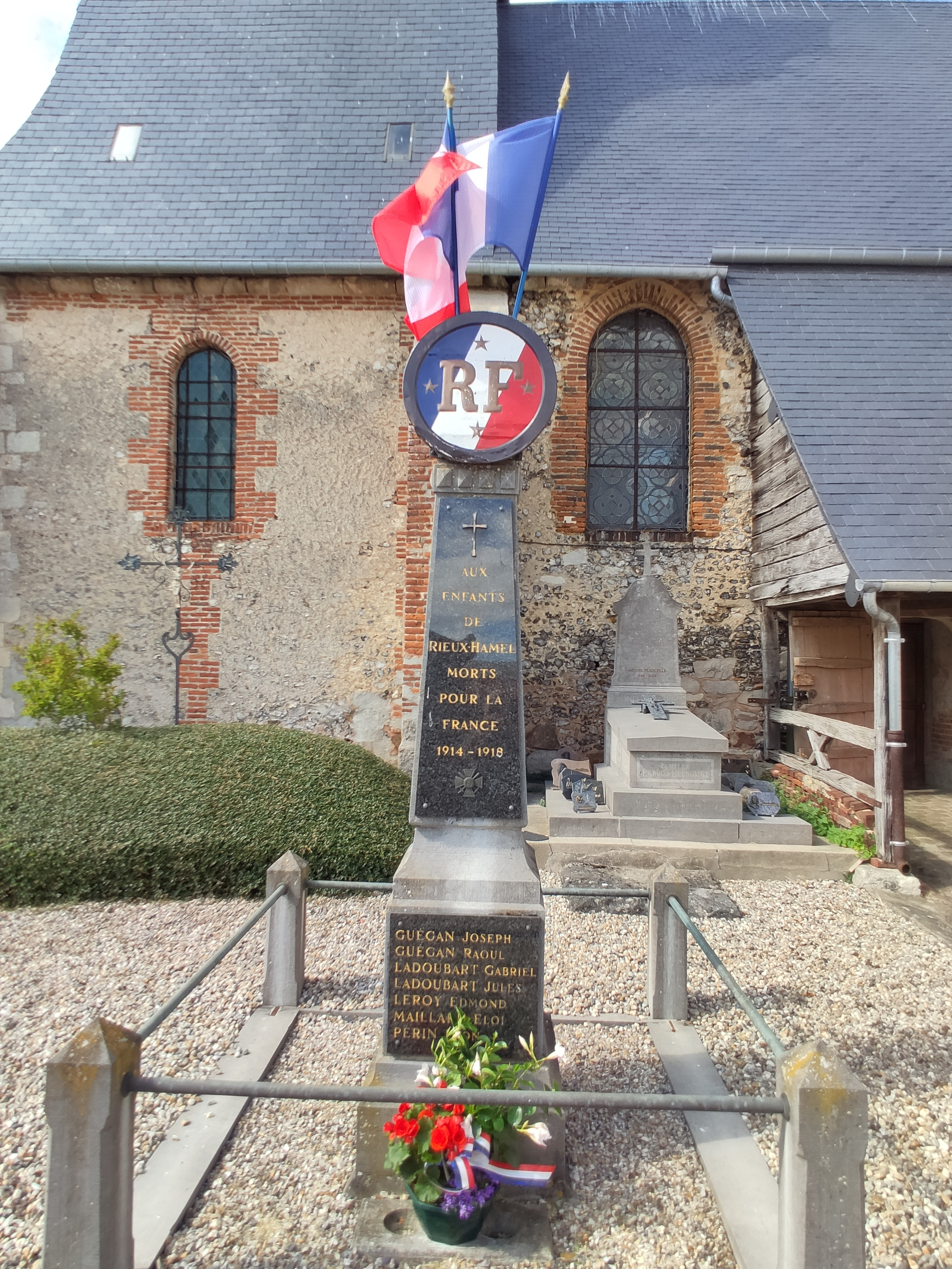 Le Hamel (Oise) - Monument aux morts pavoisé pour les fêtes du 14 juillet